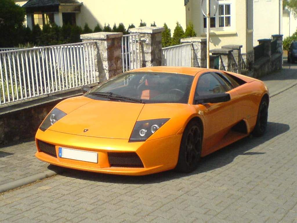 Lamborghini Murciélago